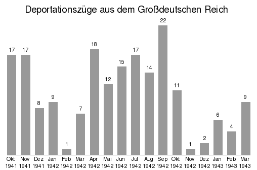 Anzahl der Deportationszüge deutscher Juden, die über 700 Personen transportierten. Daten aus Alfred Gottwaldt, Diana Schulle: Die „Judendeportationen“ aus dem Deutschen Reich 1941–1945: eine kommentierte Chronologie. Marix, Wiesbaden 2005, ISBN 3-86539-059-5. Angefertigt nach der Tabelle von Holgerjan durch Marsupilami in der Grafikwerkstatt